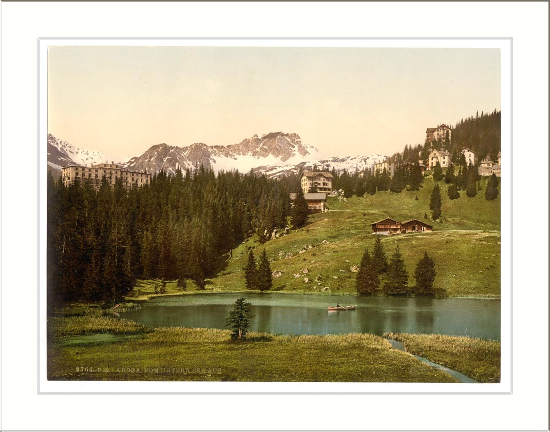 Arosa general view Grisons Switzerland